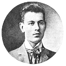 Скульптор Карл Зале. Россия, Латвия